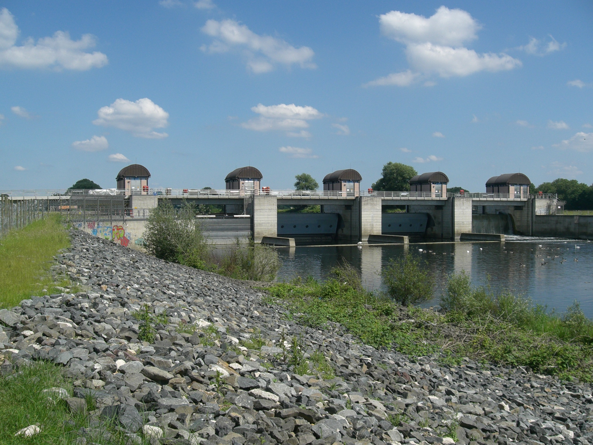 Ruhrwehr Raffelberg